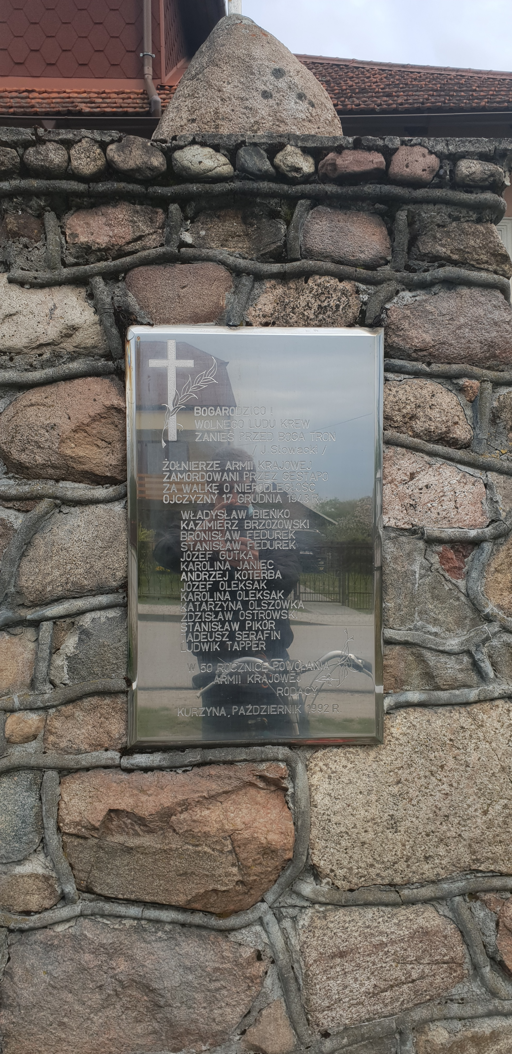 Tablica poswiecona zamordowanym przez Gestapo